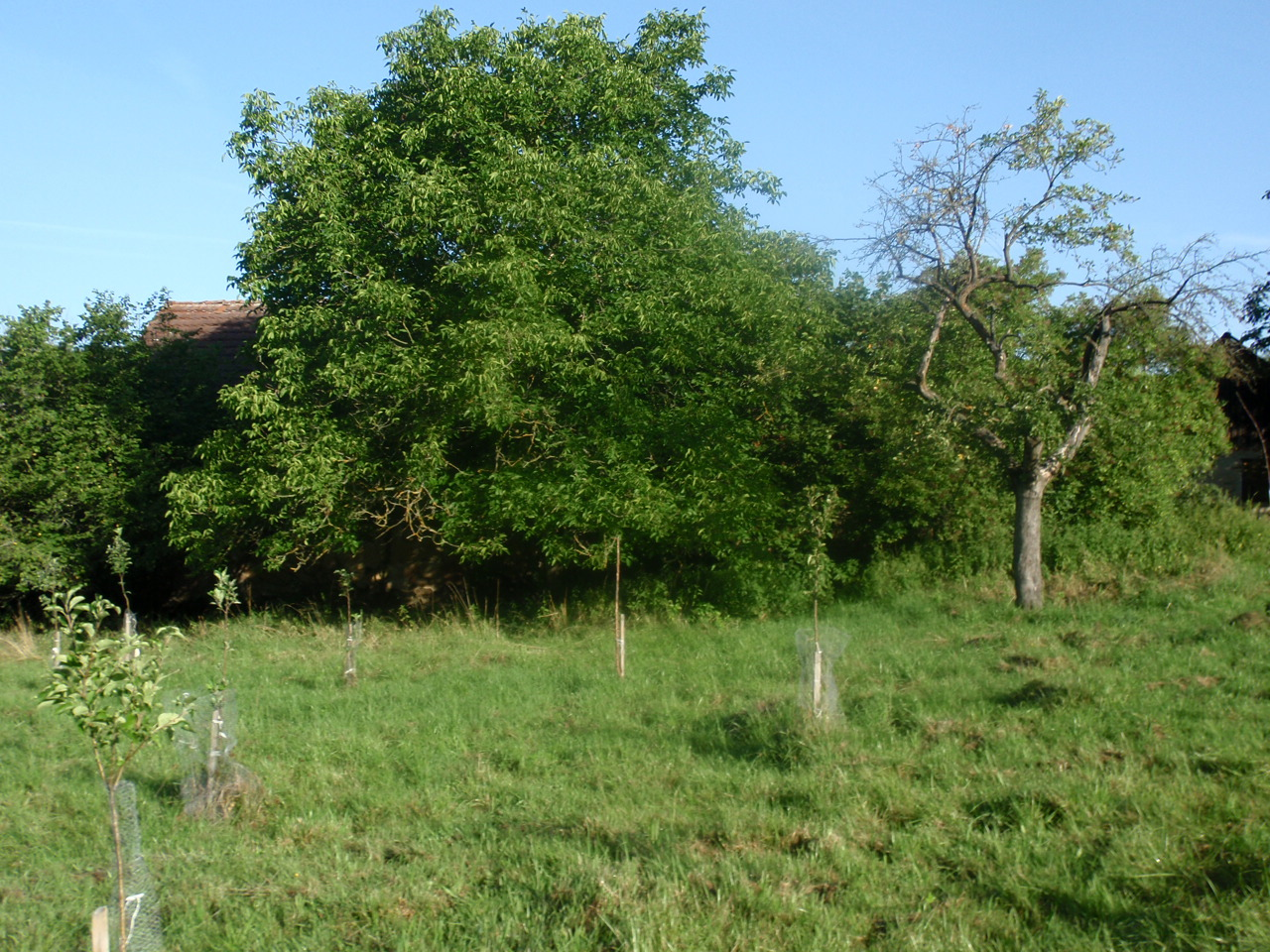 Ořešák královský (Juglans regia)